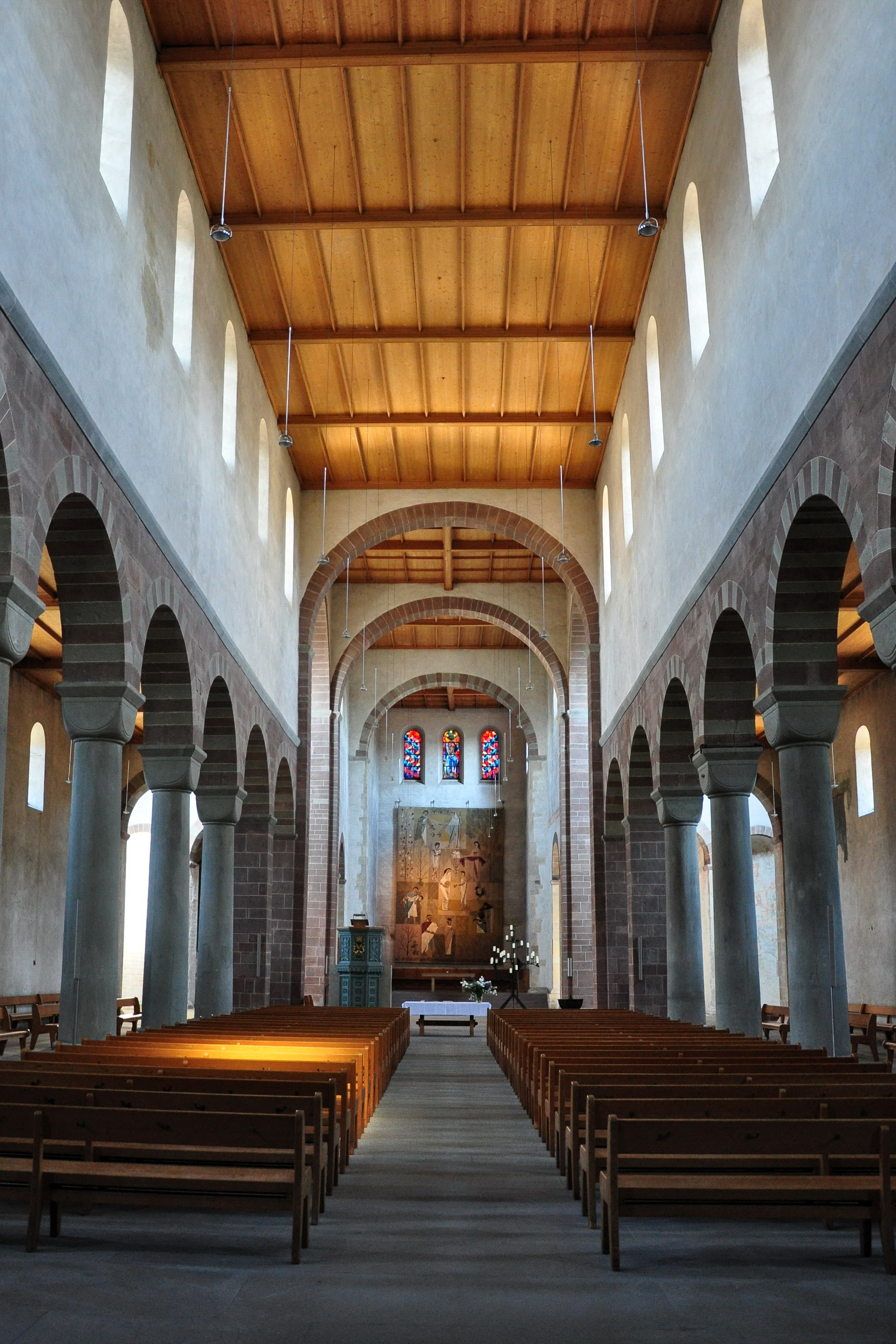 Kloster Allerheiligen in Schaffhausen (Switzerland)